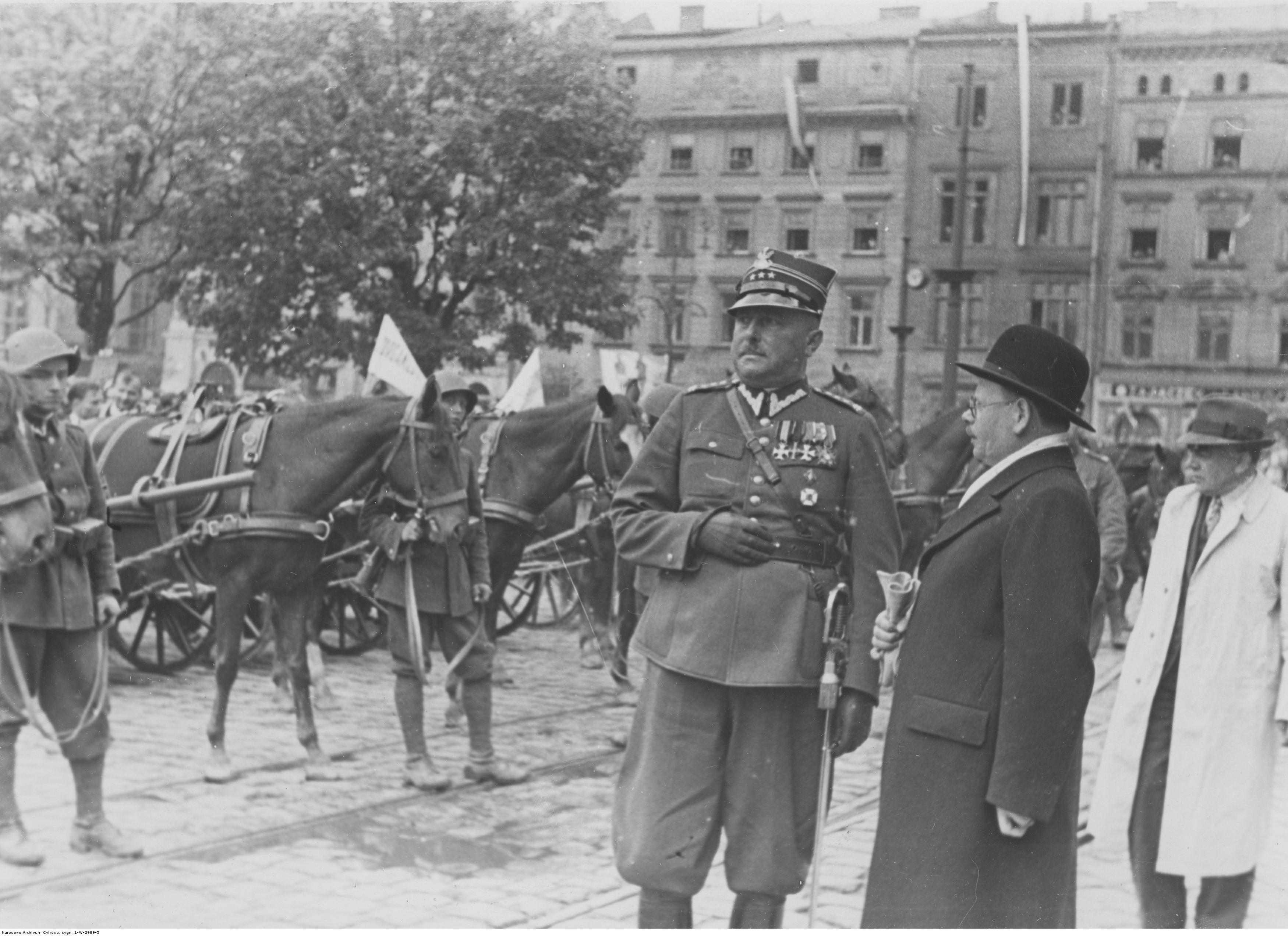 Przekazanie sprzętu wojskowego 20 Pułkowi Piechoty Ziemi Krakowskiej, ufundowanego przez ludność powiatu krakowskiego. Dowódca 20 pp płk Kazimierz Brożek w rozmowie ze starostą krakowskim dr Władysławem Wnękiem. Koncern Ilustrowany Kurier Codzienny - Archiwum Ilustracji. Sygnatura: 1-W-2989-5